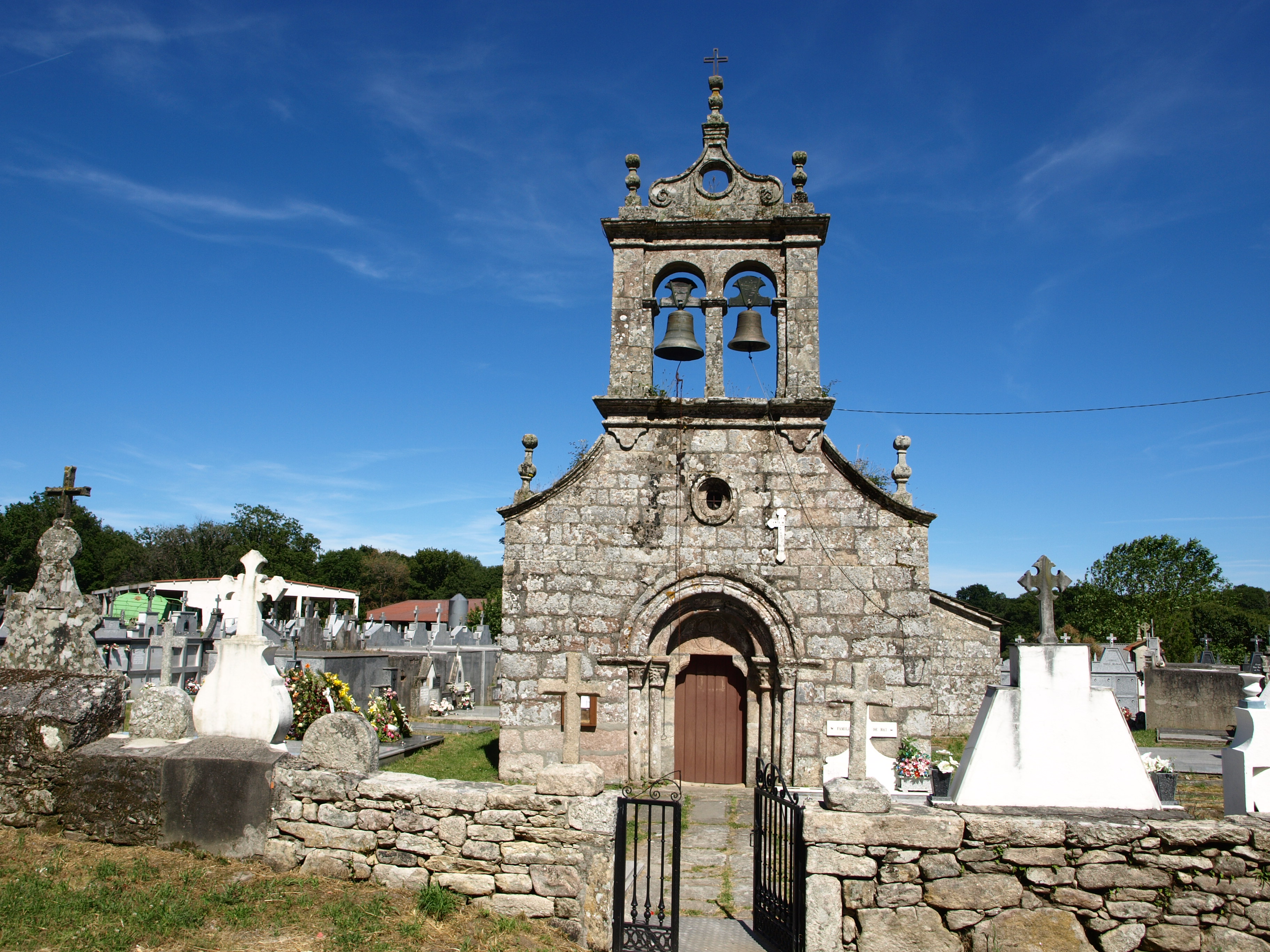 Igrexa parroquial de Vilareda (Palas de Rei)